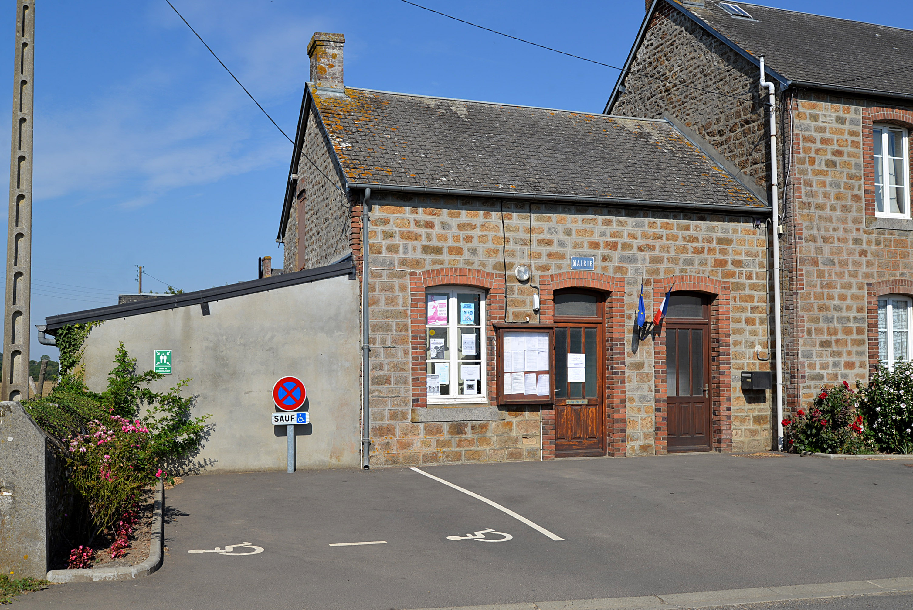 Cahan (61)